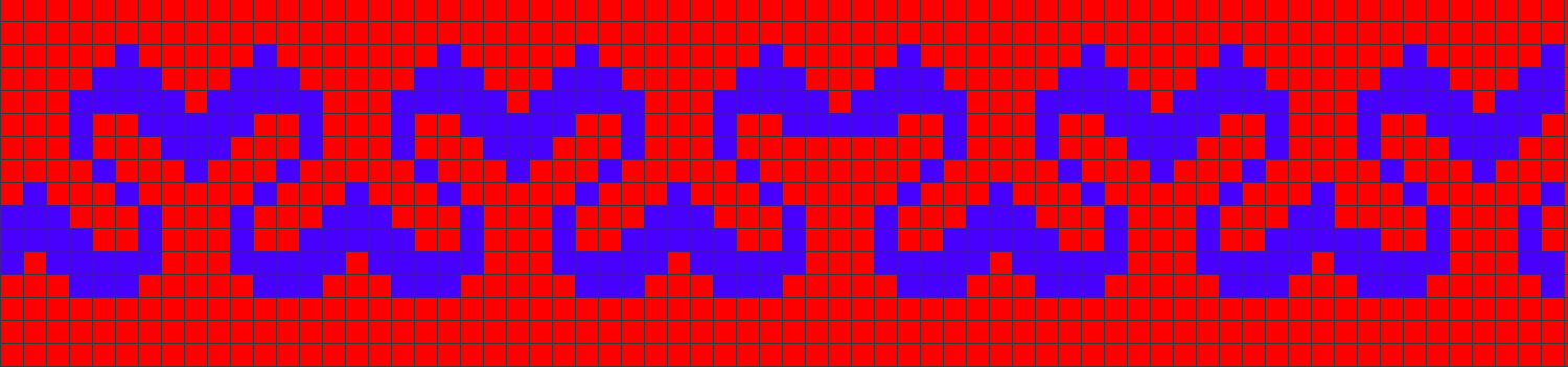 Motif tricot norvégien, frise de lettres M